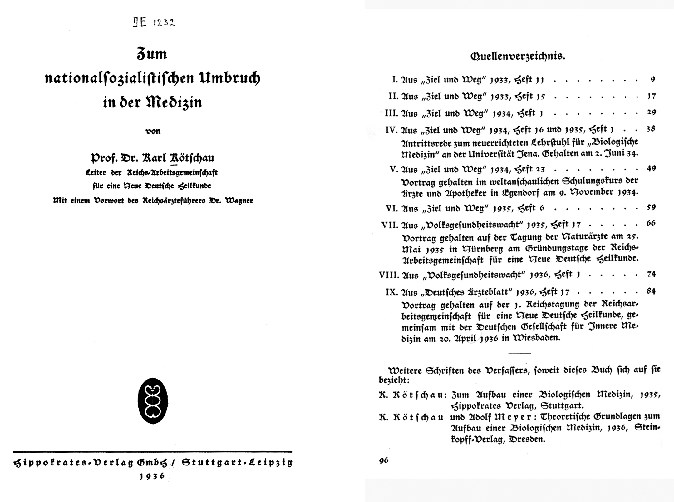 Titelseite und Quellenverzeichnis